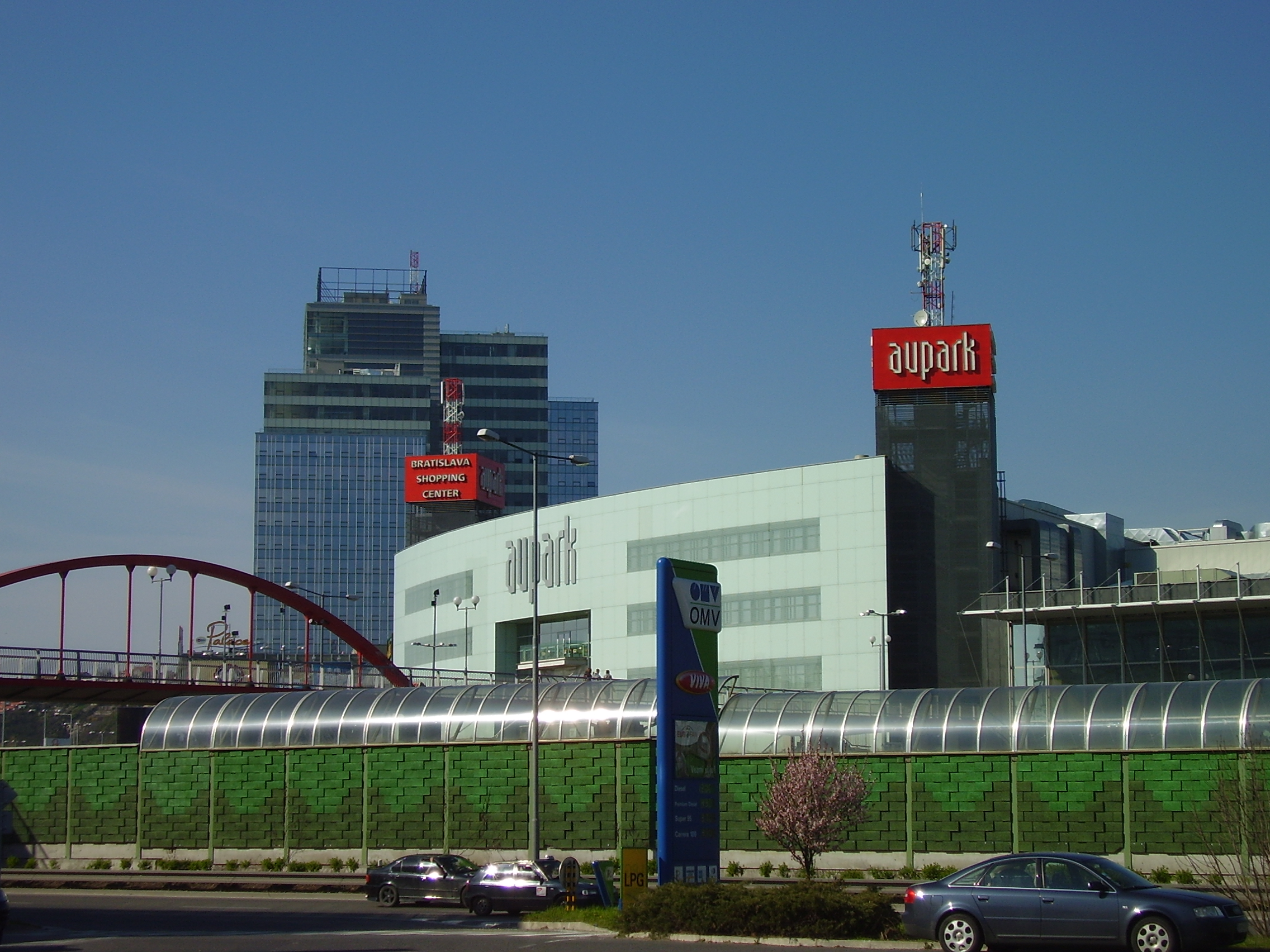 Slovakian suurin ostoskeskus Au Park sijaitsee Petržalkassa.